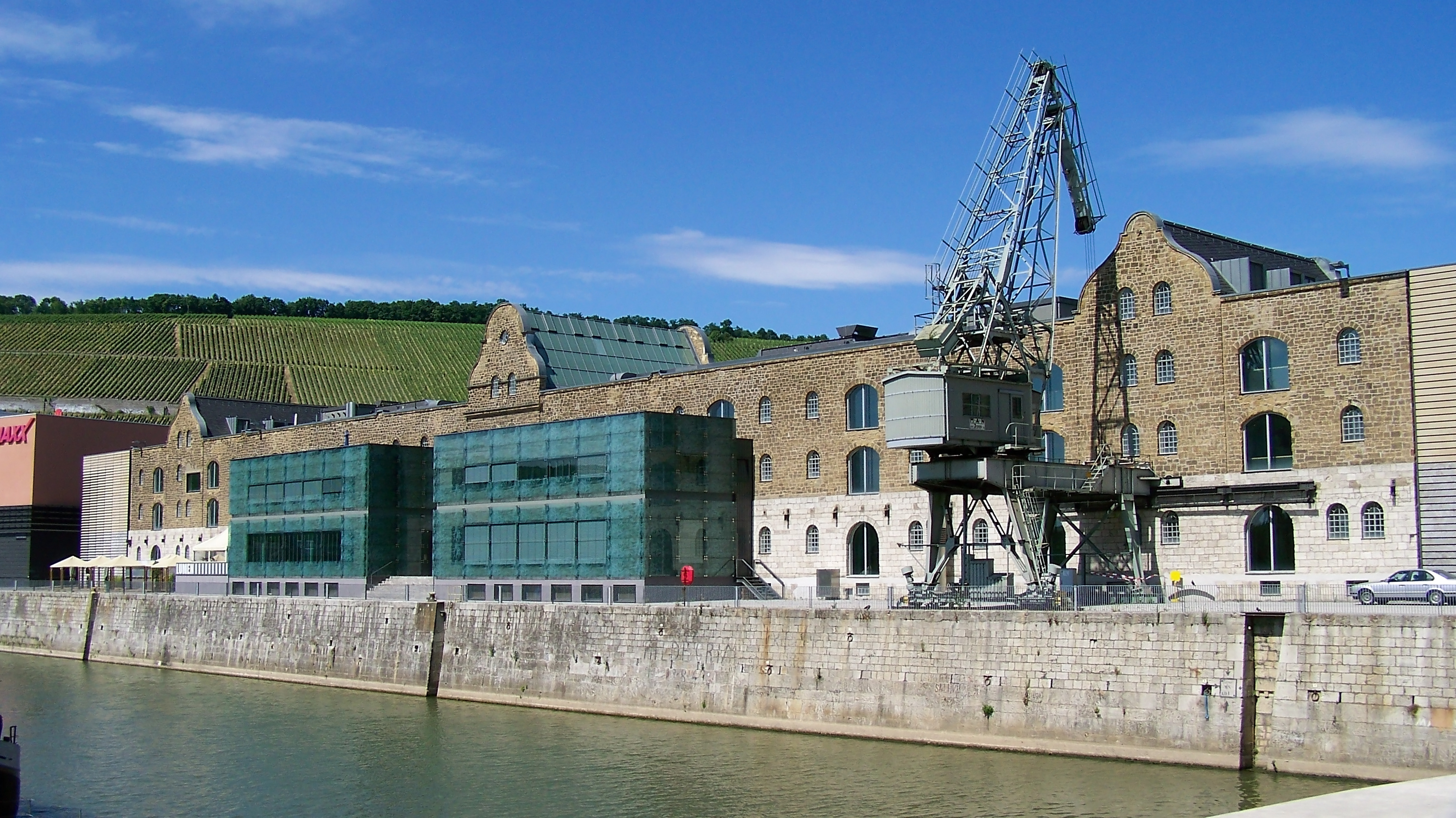 Die zum Alten Hafen gewandte Seite des Kulturspeichers in Würzburg